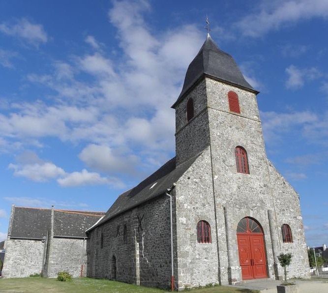 Église Notre-Dame de Cherrueix (35). Façade occidentale et flanc nord.